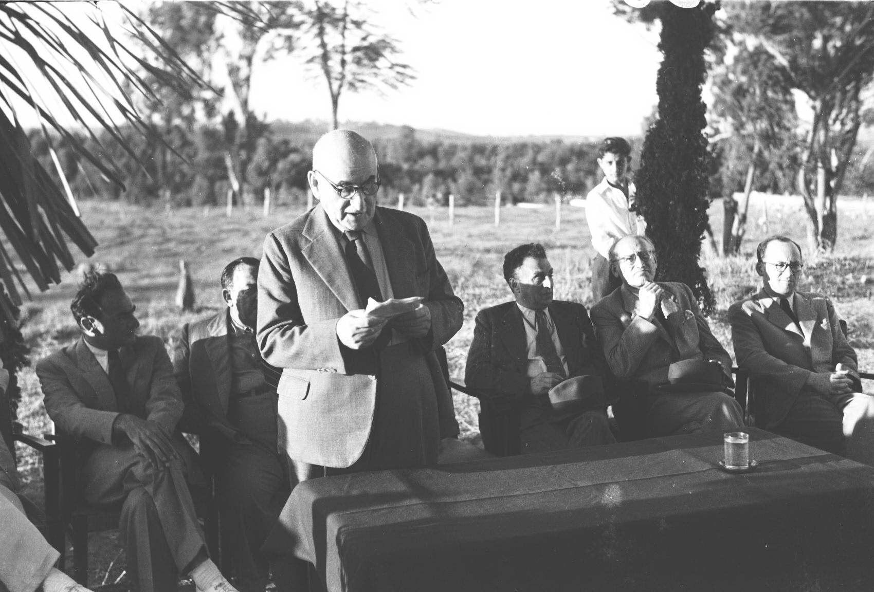 אוסף צילומים של הצלם זולטן קלוגר טווח מספרי התשלילים 25487 - 25602: הנחת אבן הפינה לבית הספר המקצועי על שם שנקר, שנקר נואם